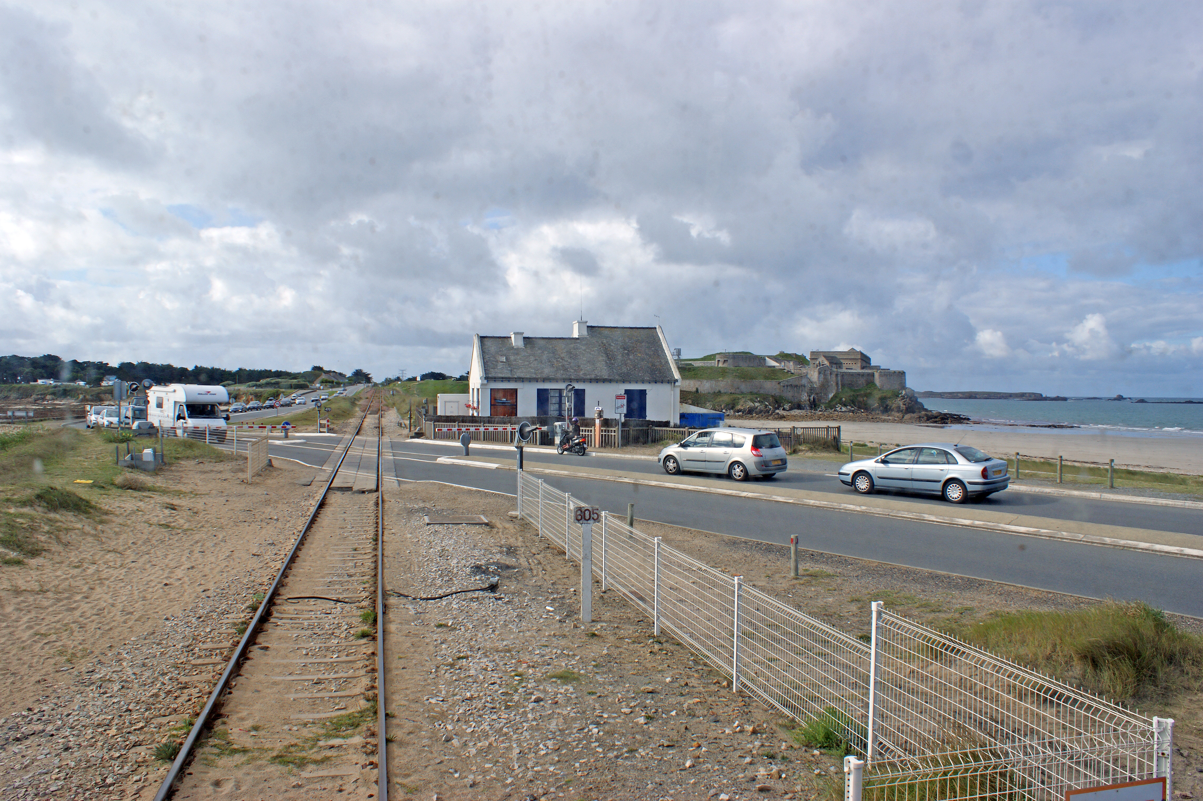 Vu de la halte, le passage à niveau et l'ancienne maison du garde barrière, avec en arrière plan le fort de Penthièvre.